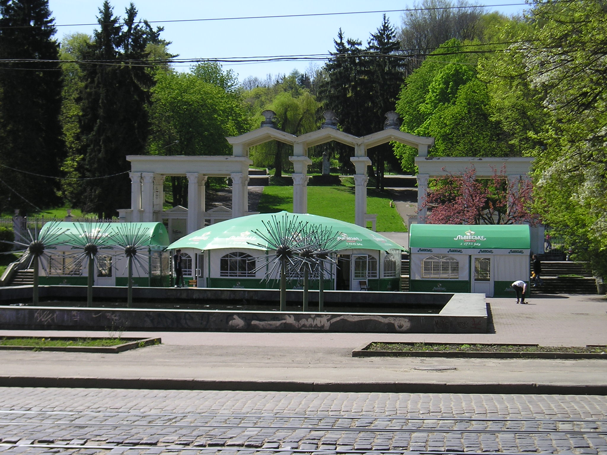 Головний вхід до парку Хмельницького (Львів). Проїзжа частина вулиці Вітовського, за нею фонтан, за ним пивні павільйони, за ними сходи і аркада